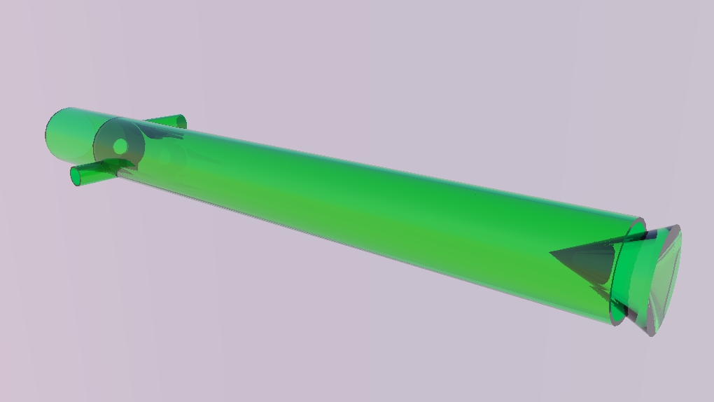 Concepção artírtica de um tubo de vórtice de vidro